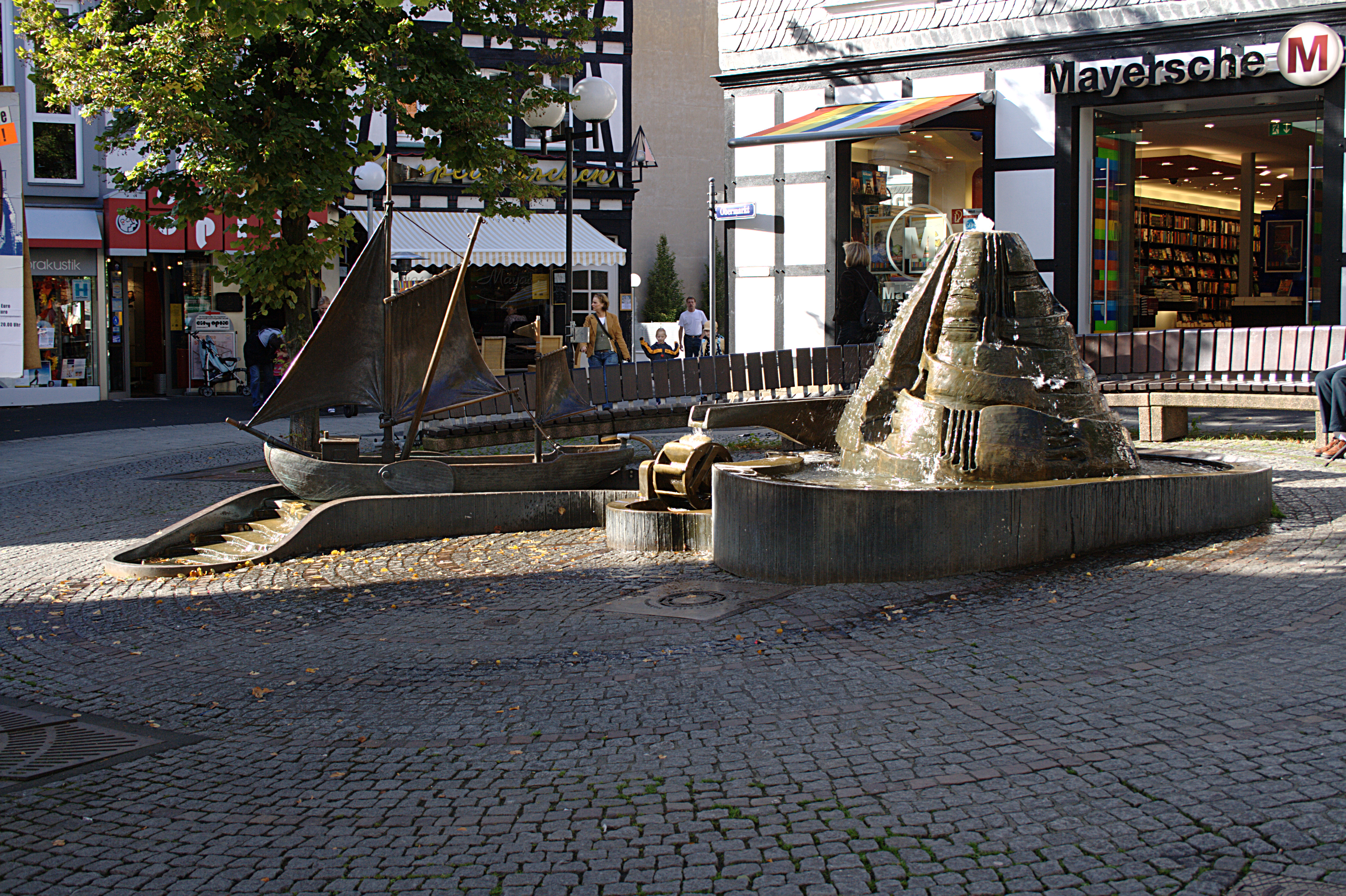 Treidelbrunnen auf dem Obermarkt in Hattingen, rechts denkmalgeschütztes Fachwerkhaus Kleine Weilstraße 27/Obermarkt 13a (Mayersche Buchhandlung)